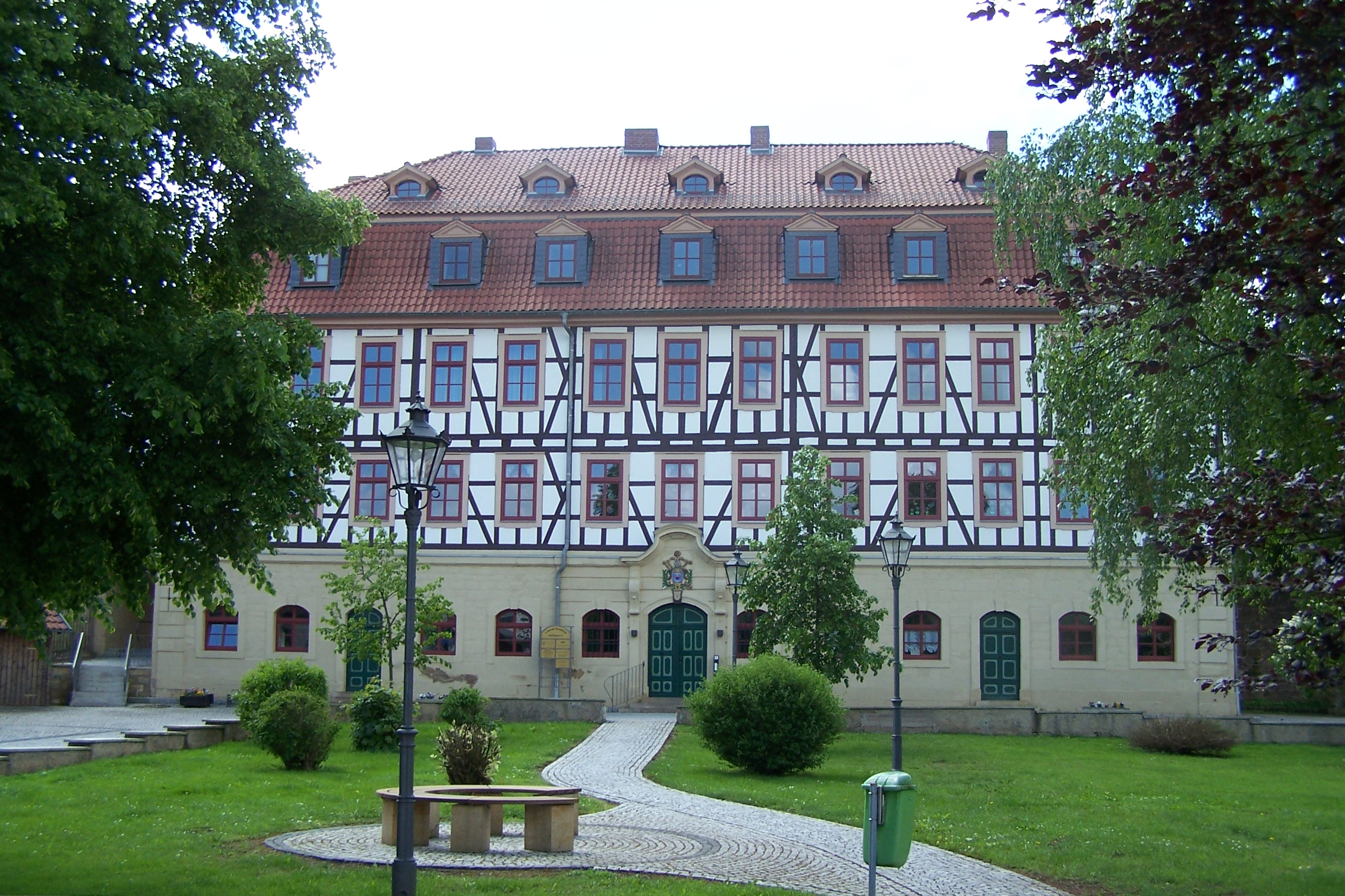 Ansichten und Details zum Schloss Bischofroda im Wartburgkreis.